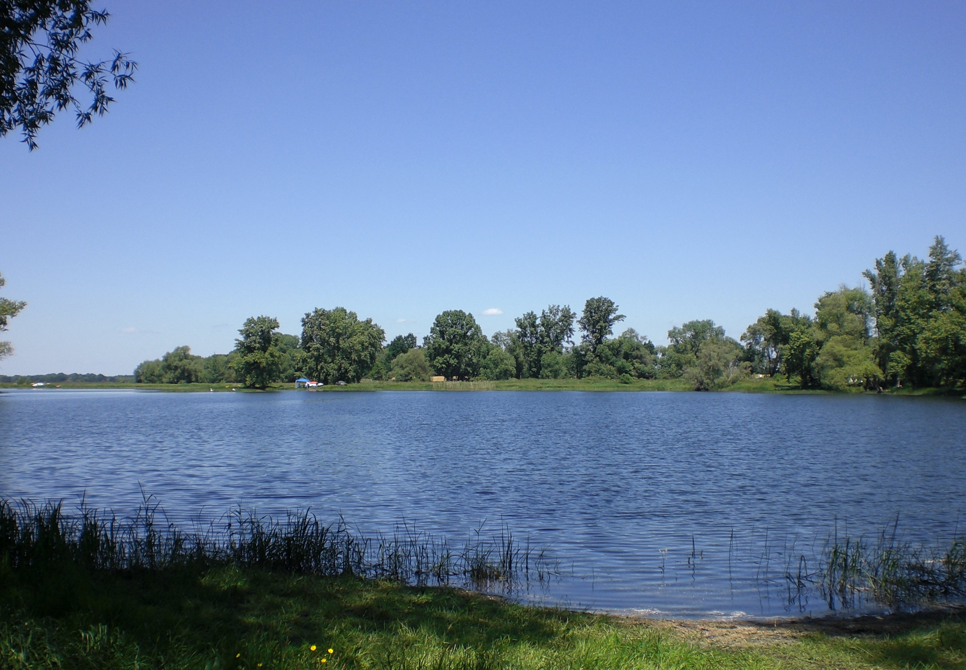 Randauer Baggerloch, Blick vom Südufer